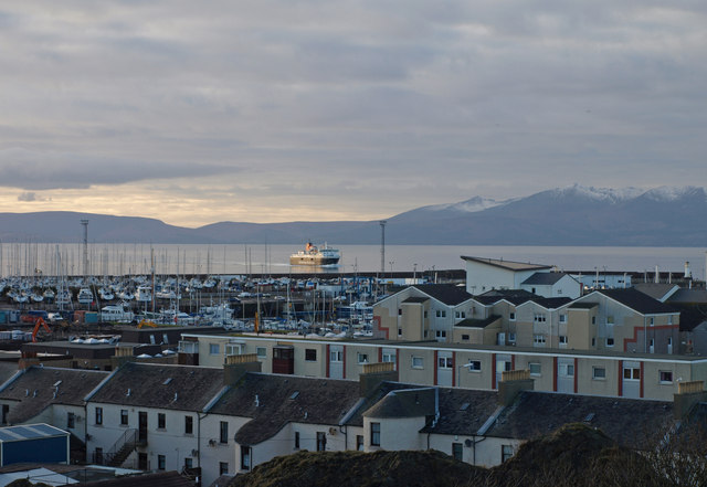 Ardrossan